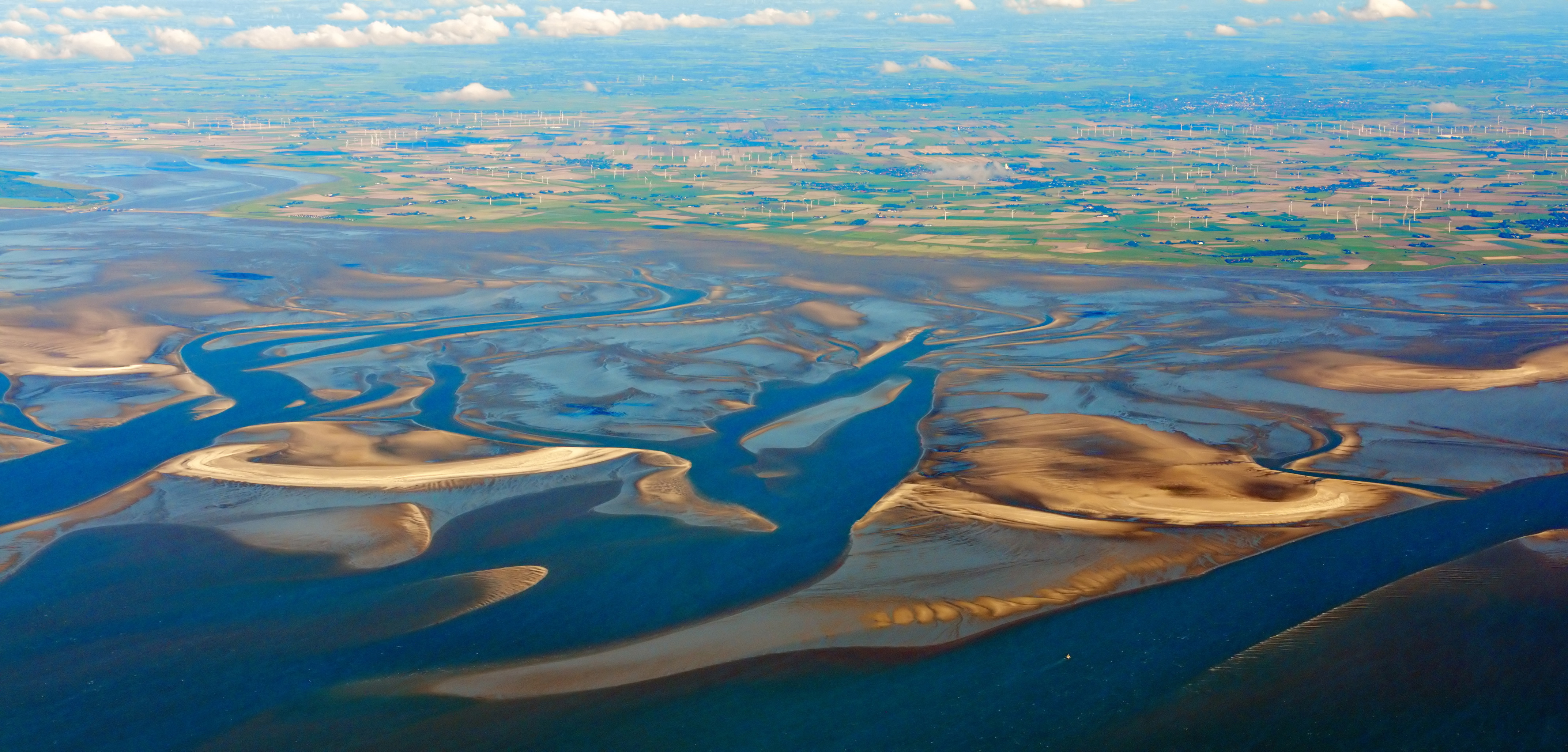 Fotoflug über das nordfriesische Wattenmeer - Norderdithmarschen (von SW), links hinten Eidersperrwerk, links außen Linnenplate mit Linnensand, vorne rechts Blauortsand, ganz rechts Blauort